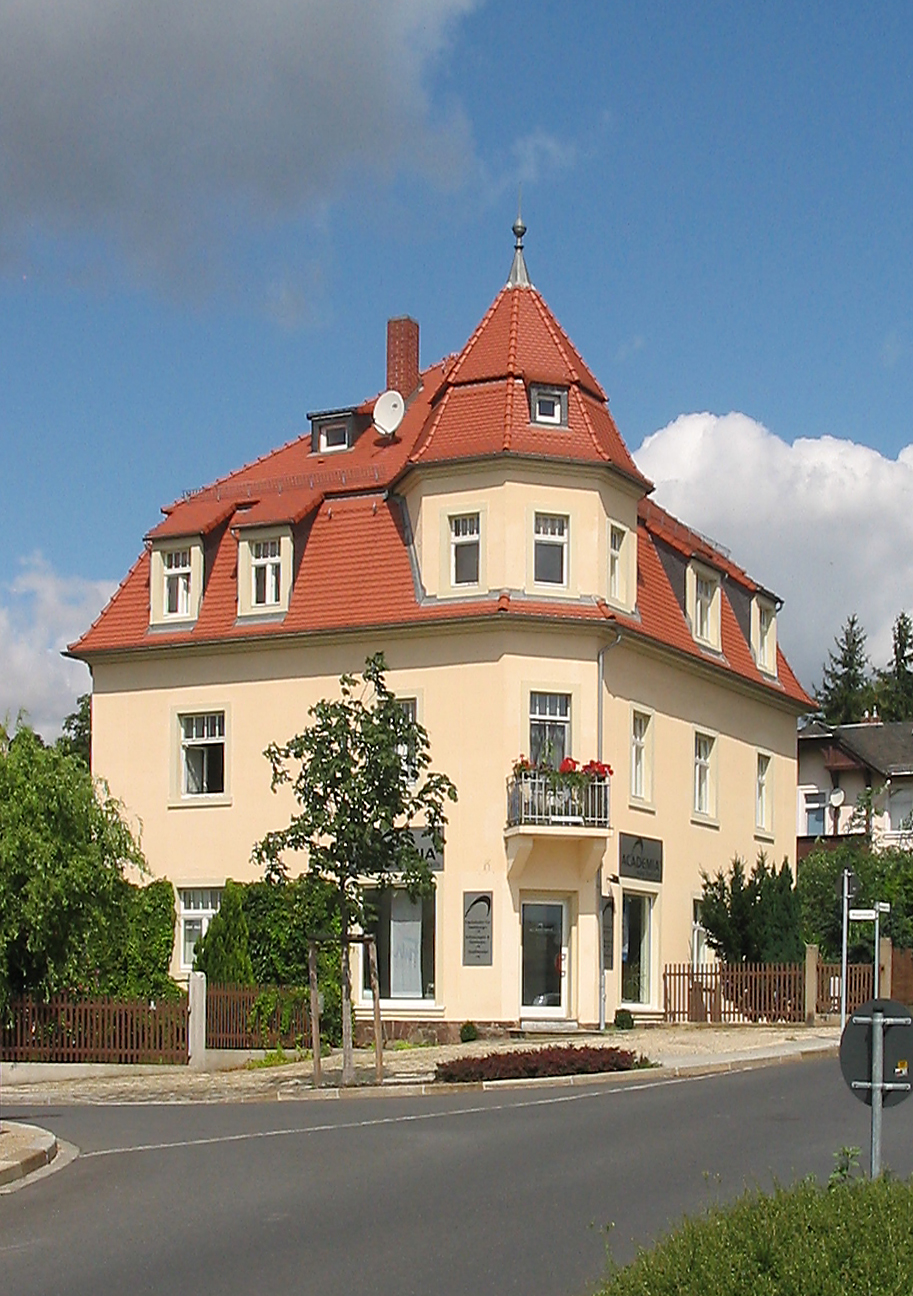 Radebeul, Moritzburger Straße 33